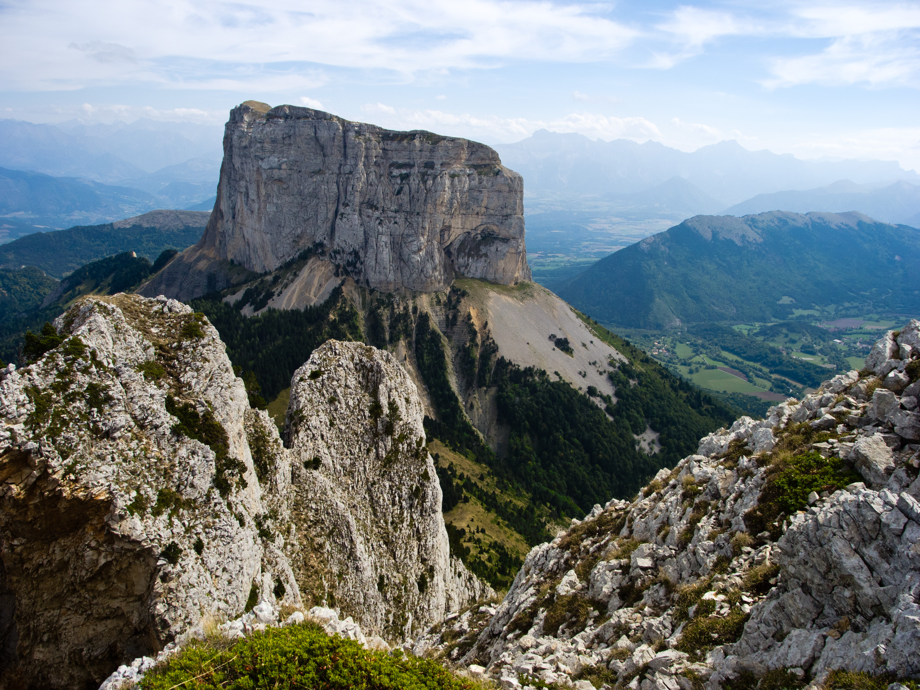 Le Mont Aiguille depuis le haut des rochers du Parquet.